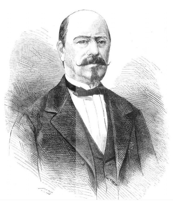 Militar y político carlista